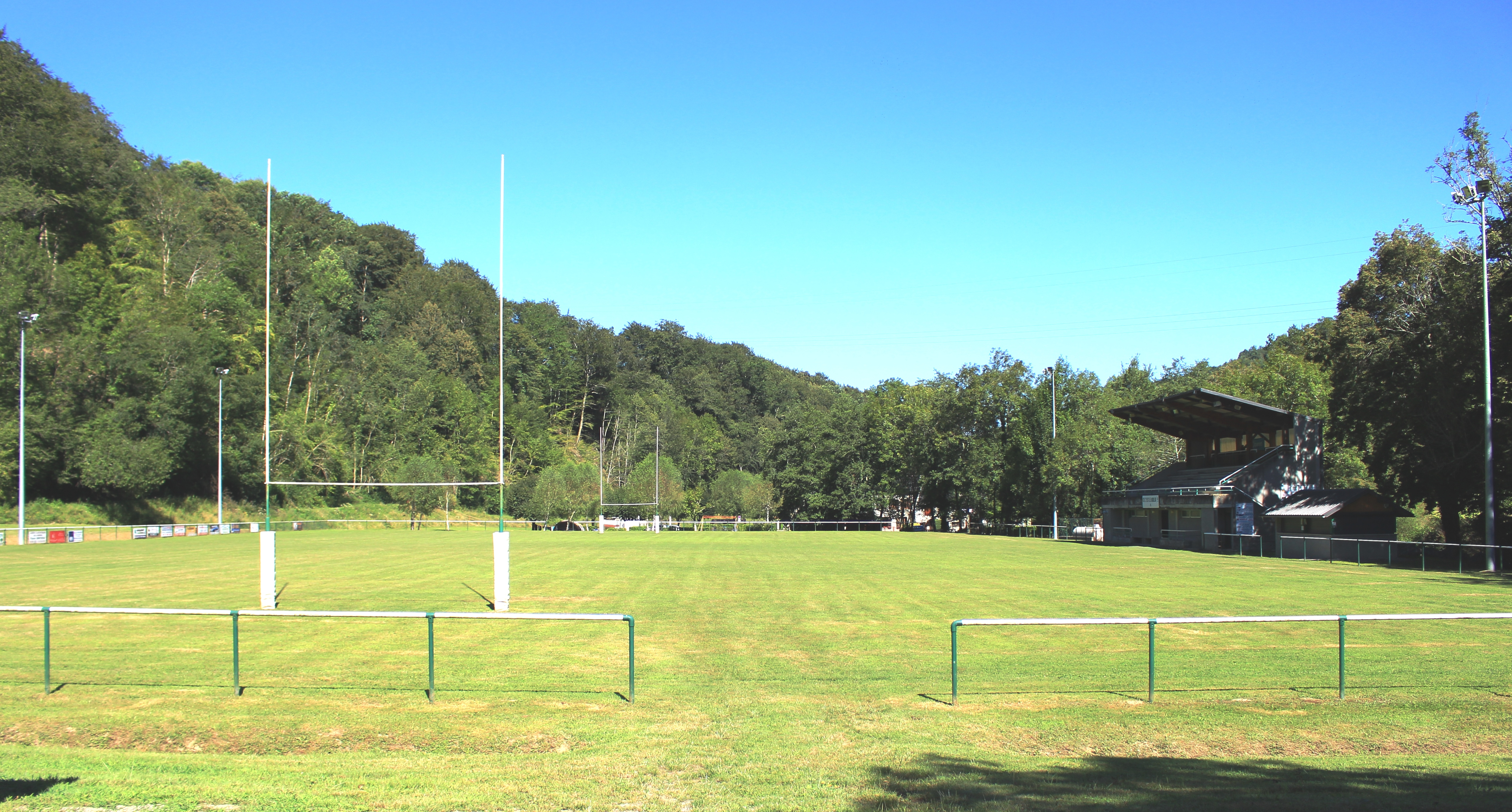 Stade de rugby de Sarlabous (Hautes-Pyrénées)